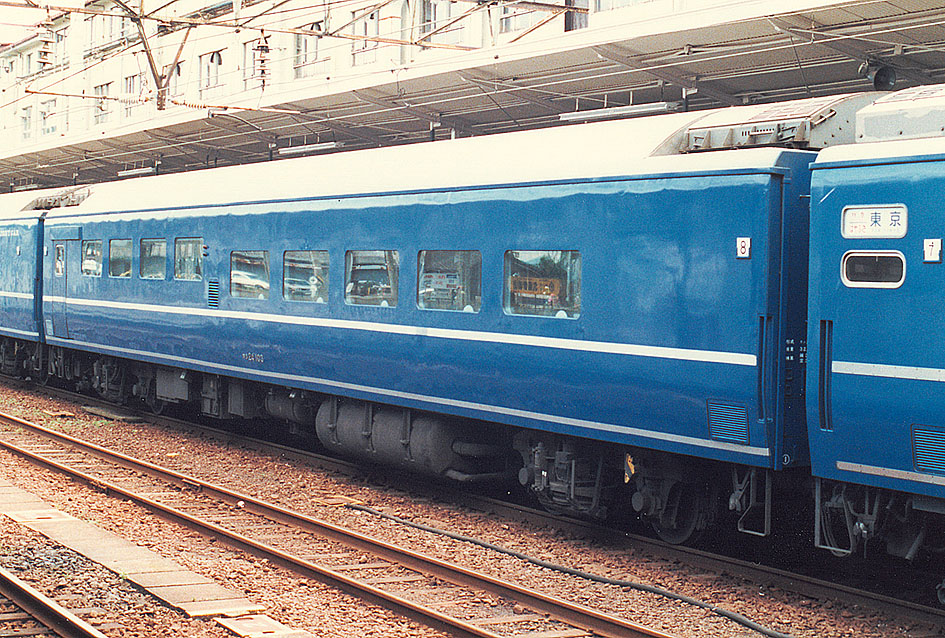 国鉄 オシ24 103